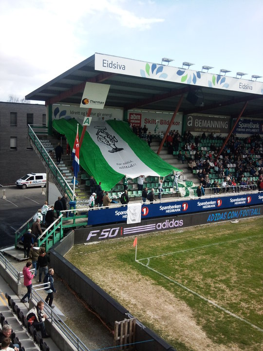 TIFO fra oppgjøret Hamarkameratene - Brumunddal 1-2 i 2010.